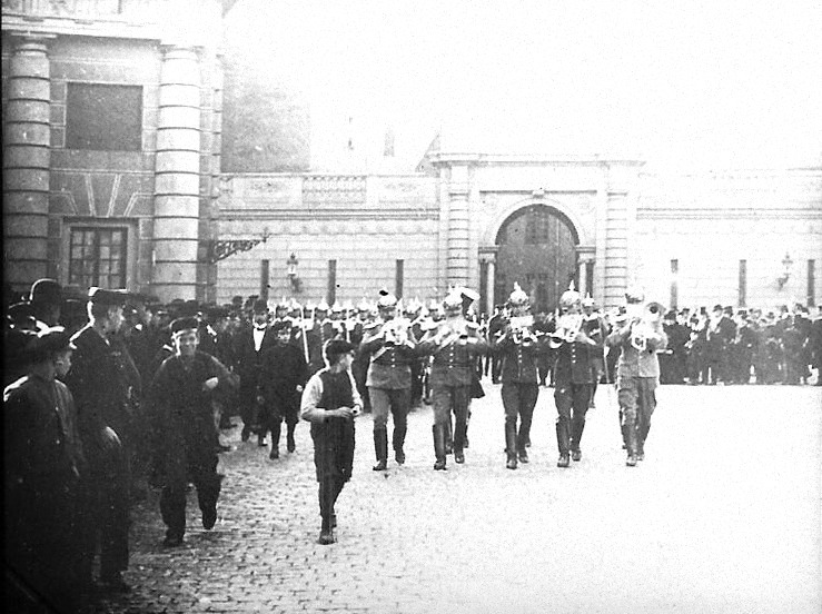 K1 högvakt omkring 1910